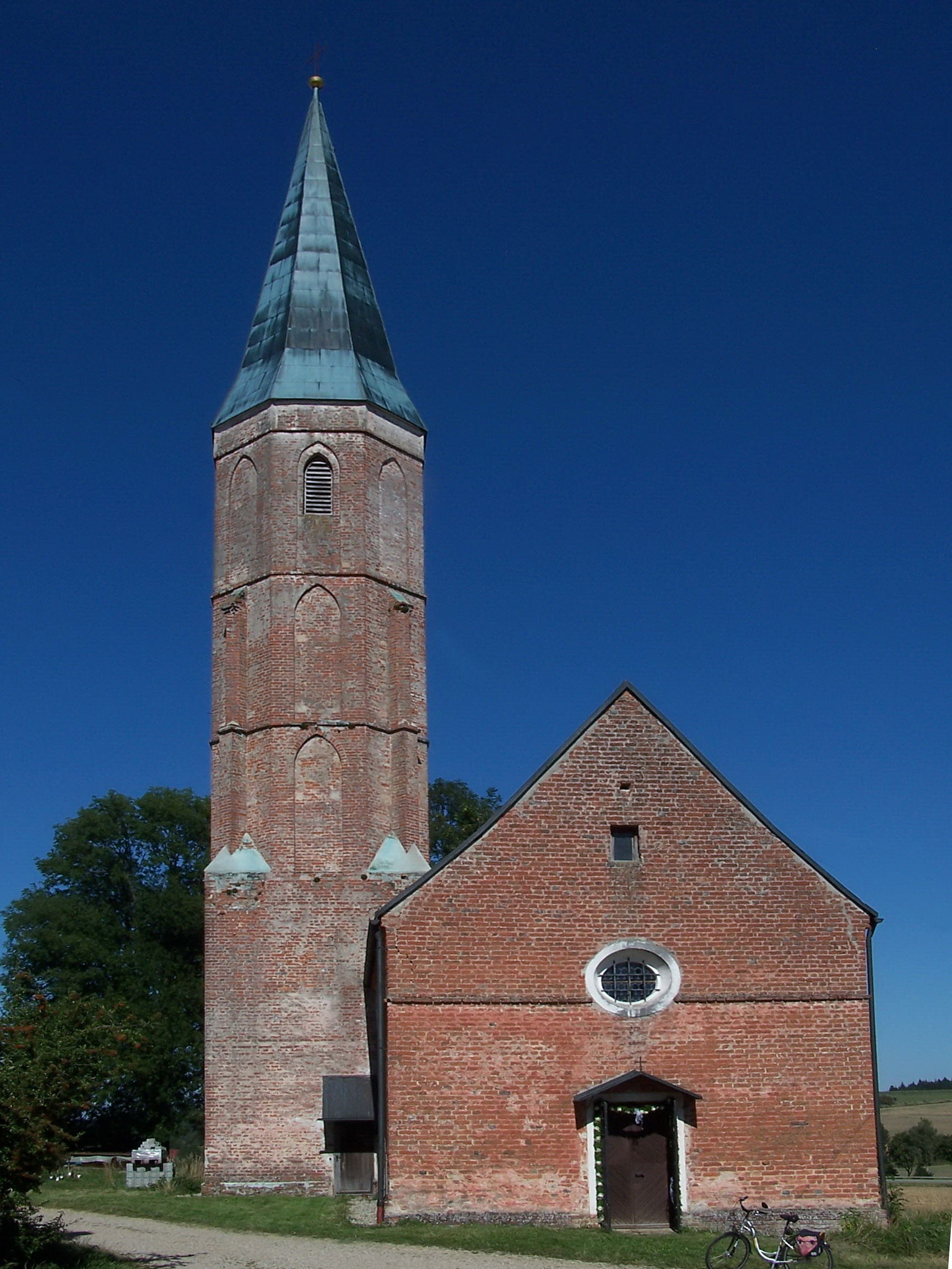 Pfeffenhausen, Eichstätt 18 1/2. Katholische Filialkirche St. Blasius. Saalkirche mit eingezogenem Chor. Der Turm nördlich am Chor mit der Sakristei im geräumigen Untergeschoß. Außen am Chor schwache Dreiecklisenen. Ein Friesband unter dem Dachansatz umläuft Chor und Langhaus. Der im Vergleich zum Baukörper der Kirche sehr große und massige Turm hat einen quadratischen, zweigeschossigen Unterbau und einen dreigeschossigen, achtseitigen Oberbau. Einmal abgesetzte Eckstreben, aus der Steildachung des Unterbaus ansteigend, vermitteln den Übergang vom letzteren zum Oktogon. Der Oberbau ist durch Spitzbogenblenden belebt und mit einem gekröpften Spitzhelm bekrönt. Die Kirche, ein Blankziegelbau, ist ein typisches Beispiel der Landshuter Backsteingotik auf dem Lande, gehoben durch reichere Turmgestaltung.